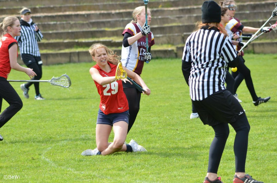 Hannover vs. SCC Berlin und Blax Spielstand 10:7